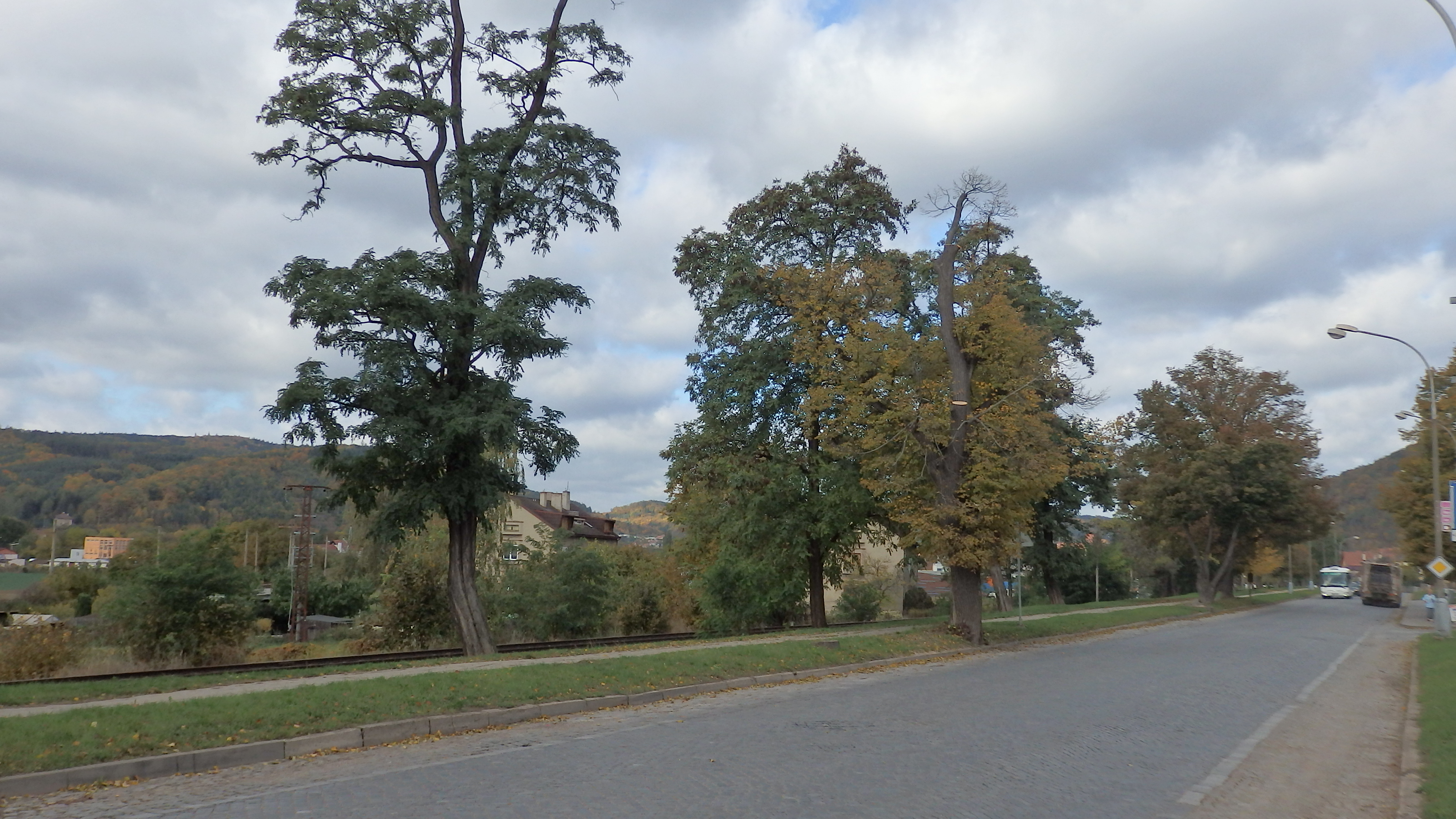 Tišnov, ulice Brněnská, památné stromy - lipové stromořadí